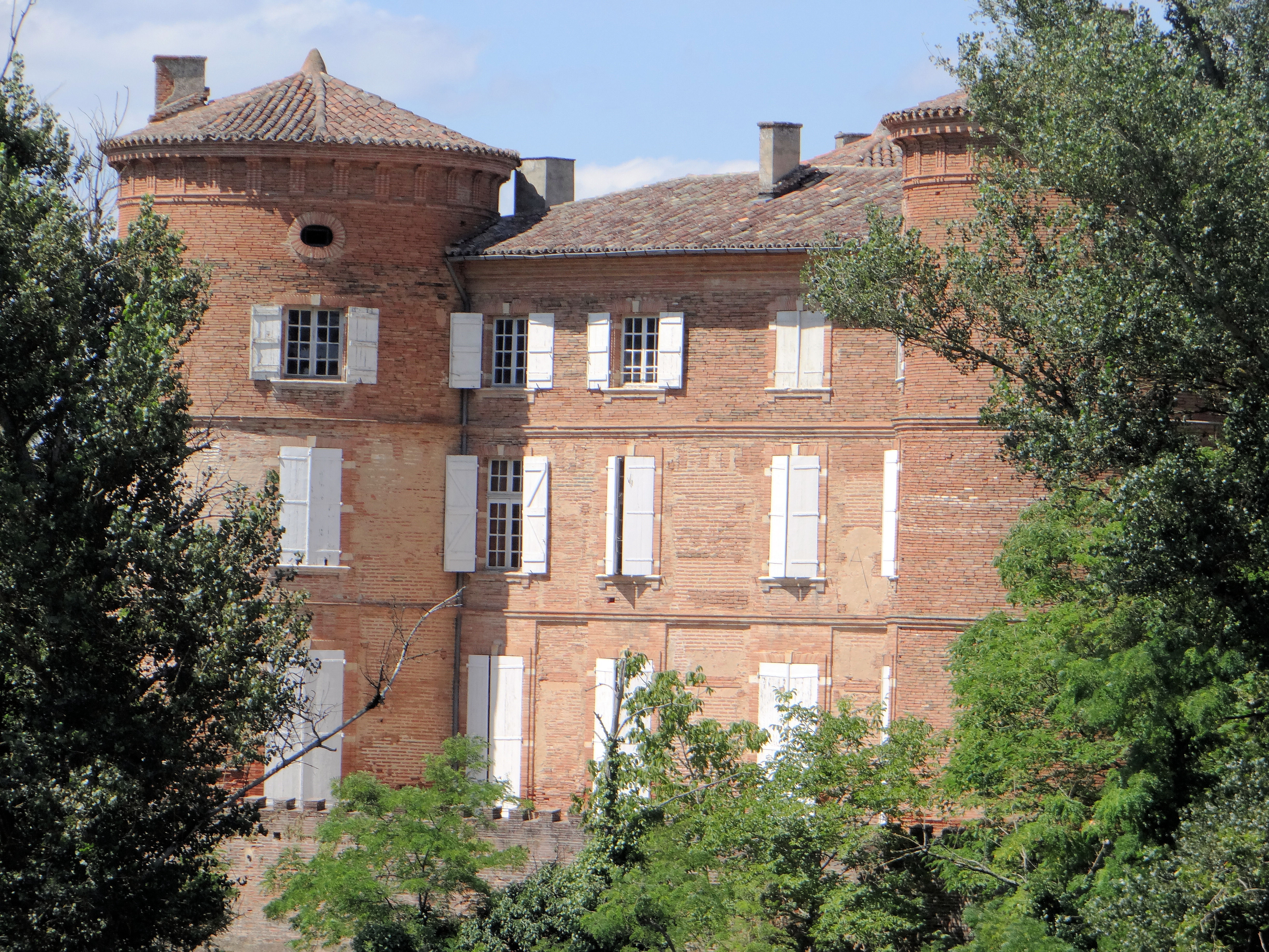 Château de Reyniès - Façade donnant sur le Tarn